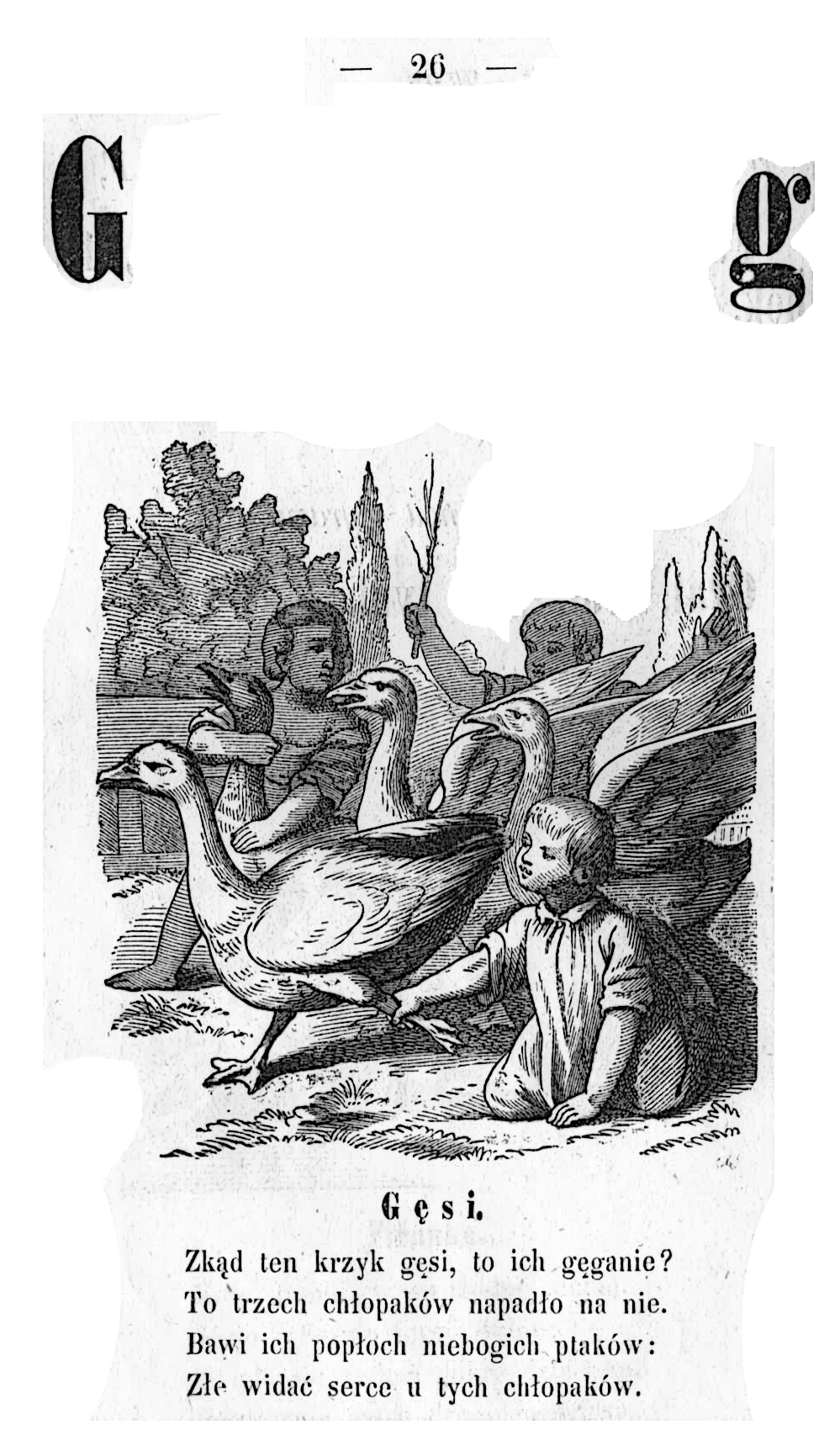 "Elementarz. Z materiałów ś. p.... Przygotowanych ", Stanisław Jachowicz